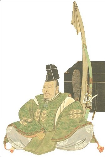 菊池重朝の肖像。